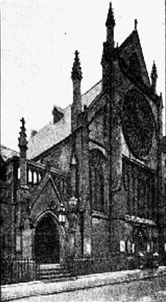 London Tabernacle - Biuro Oddziału Świadków Jehowy utworzone w 1900 roku. Siedziba do 1911 roku. (zdjęcie z kwietnia 1908)